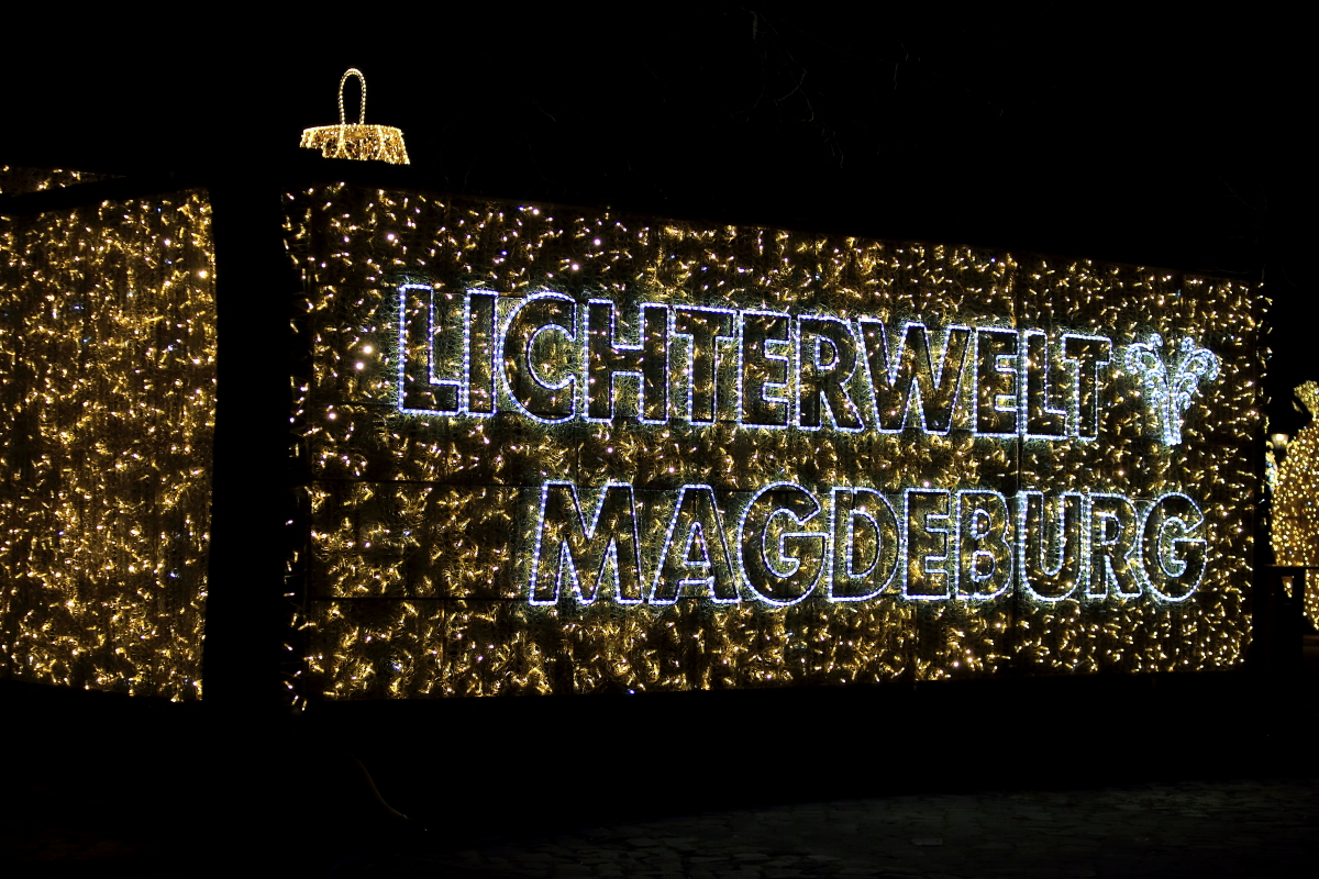 Lichterwelt – Magdeburger Weihnachtsmarkt